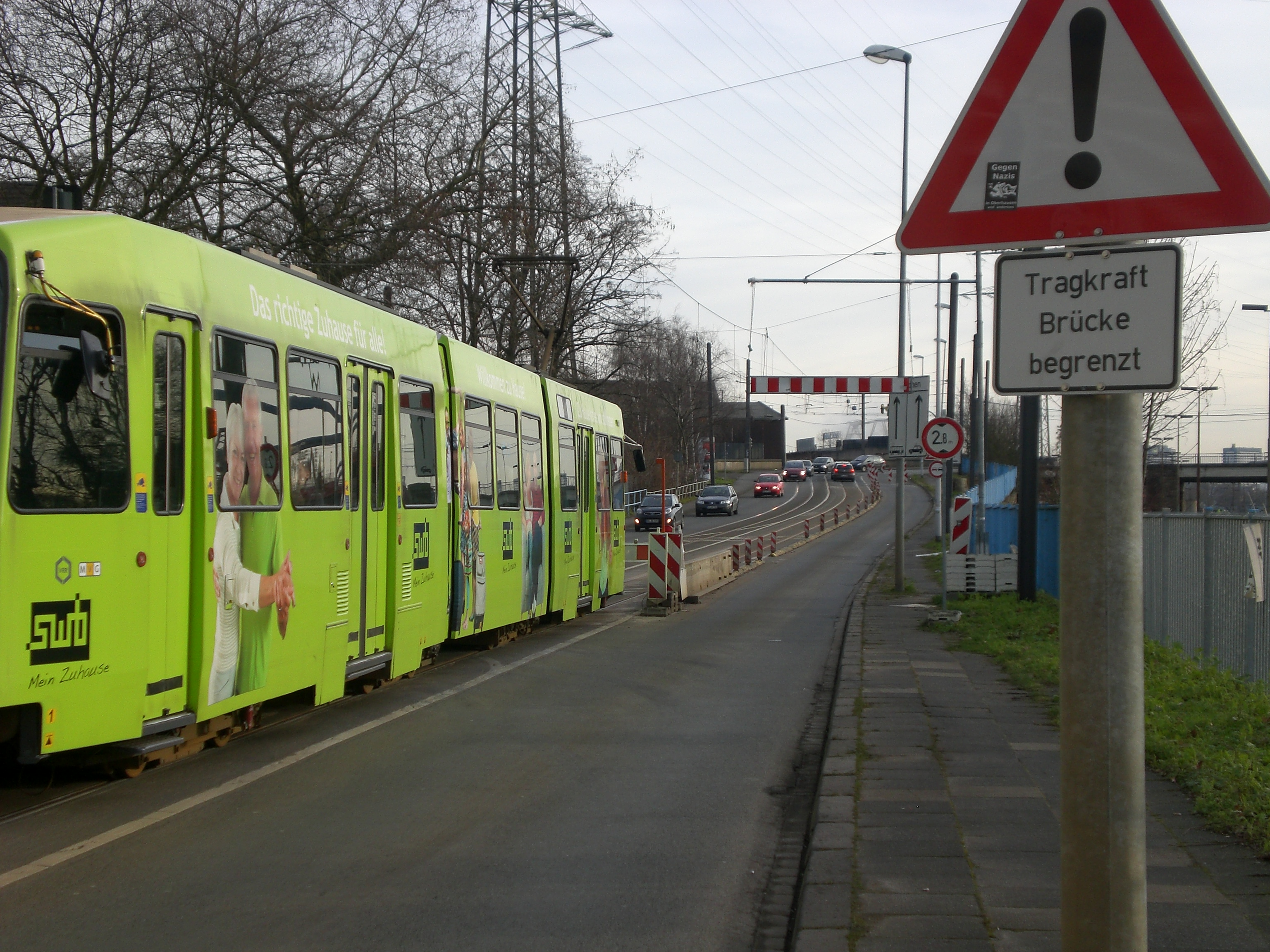 Straßenbahnlinie kurz vor der Brücke. Die Schranke verhindert, dass Pkw auf der Straßenbahnspur die Brücke hochfahren.